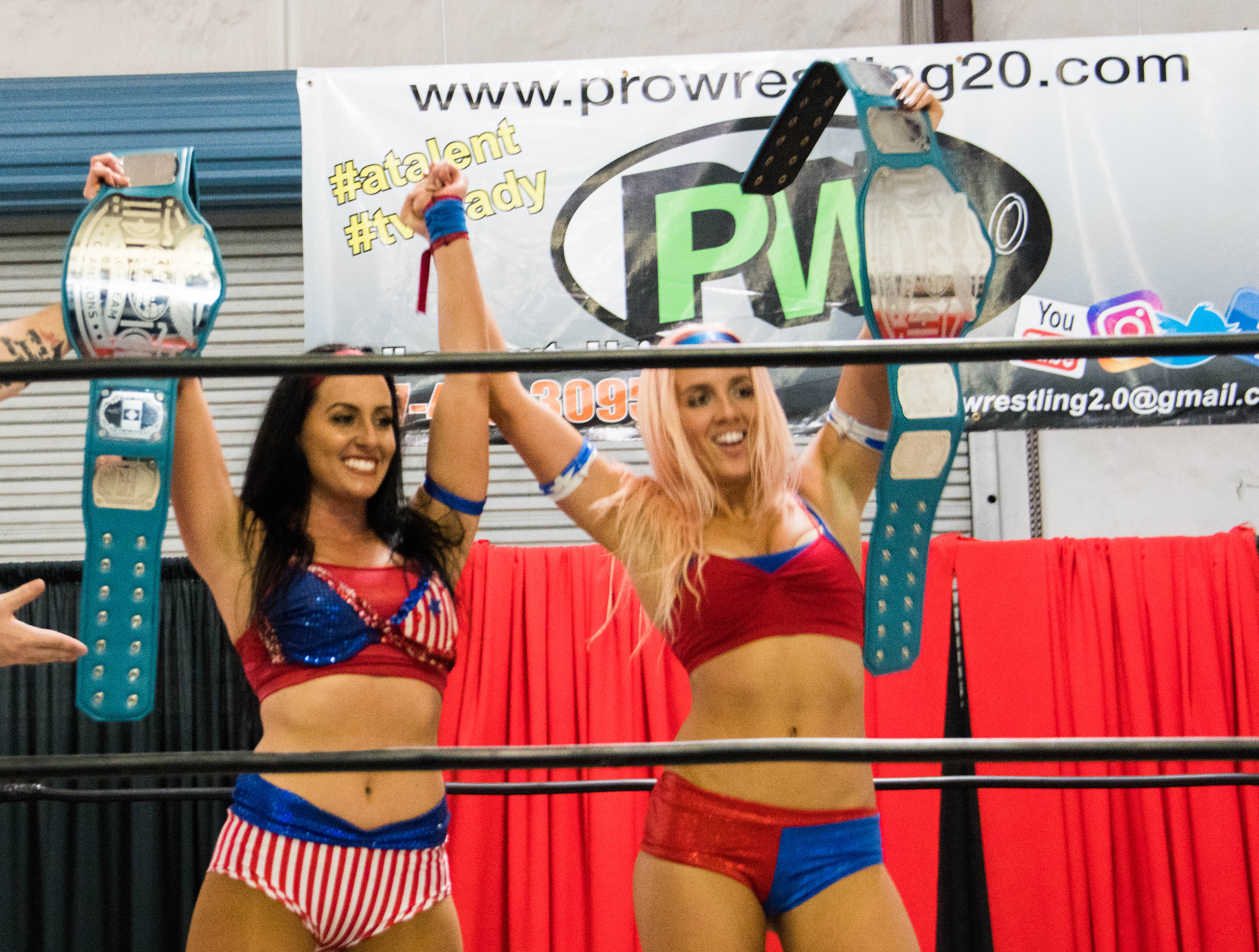 Les catcheuses Santana Garrett (à gauche) et Laurel Van Ness (à droite) brandissant les ceintures de championnes féminine par équipes de la Pro Wrestling 2.0 (une petite fédération de catch de Floride).